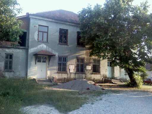 Nekadašnja Osnovna škola „Sveti Sava“ u Gracu.